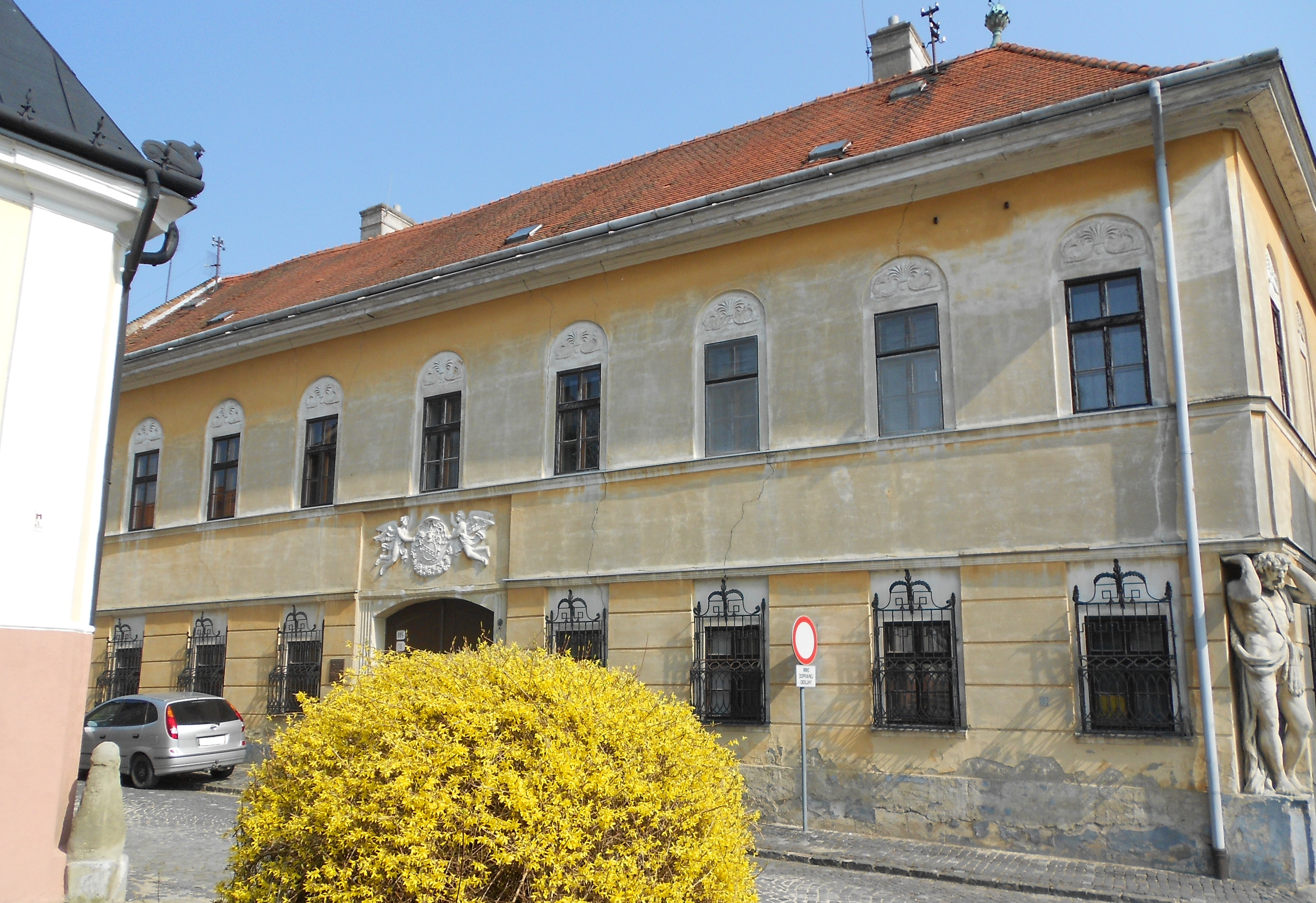 Kanónia - dom kanonika Gregušku